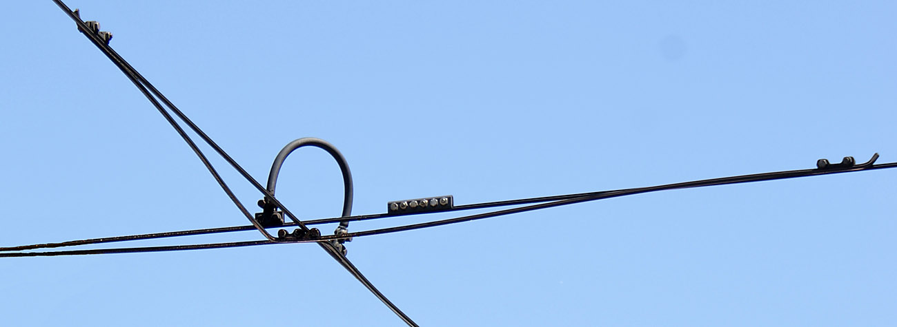 Oberleitungskreuzung, Abstandshalter (Wien)